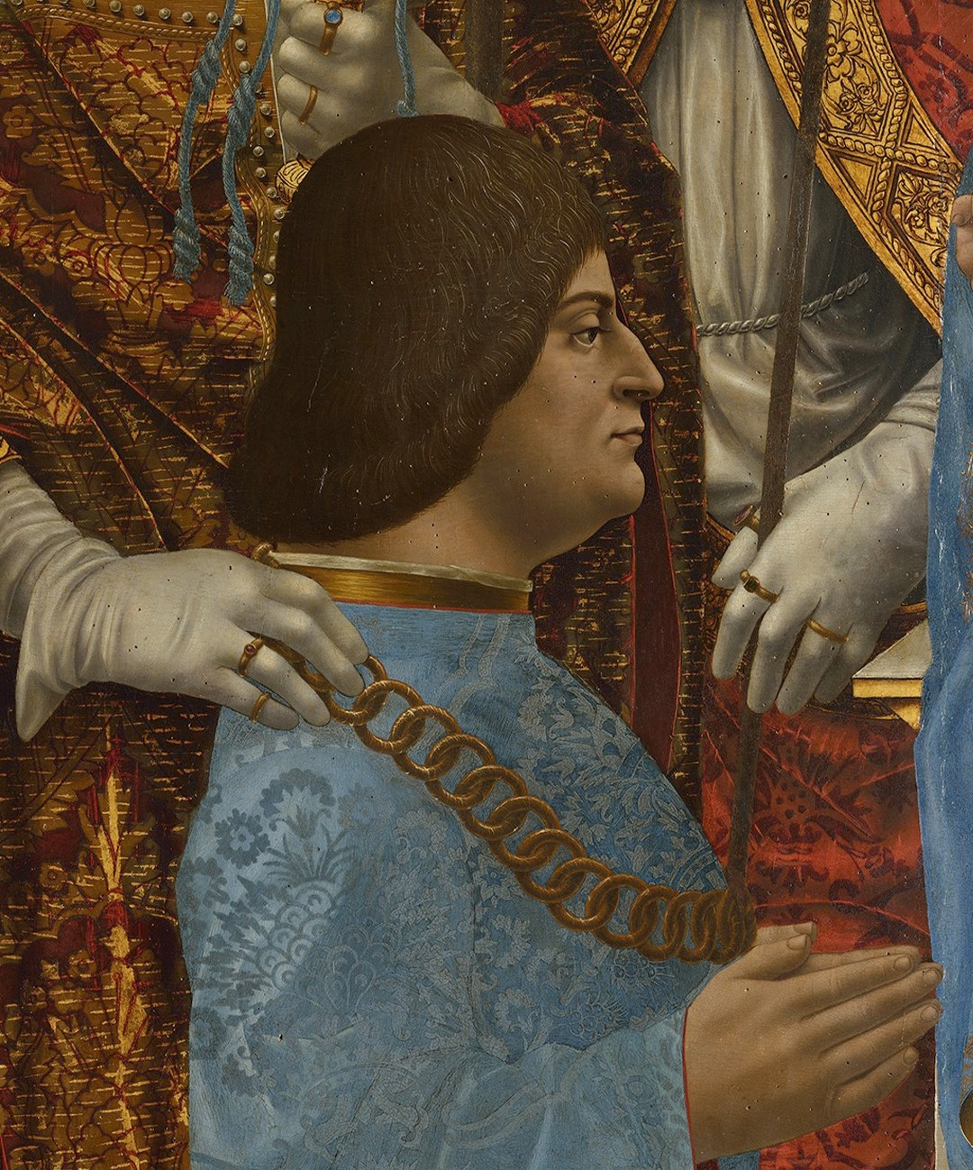 detail: Ludovico Il Moro and his son Massimiliano Sforza